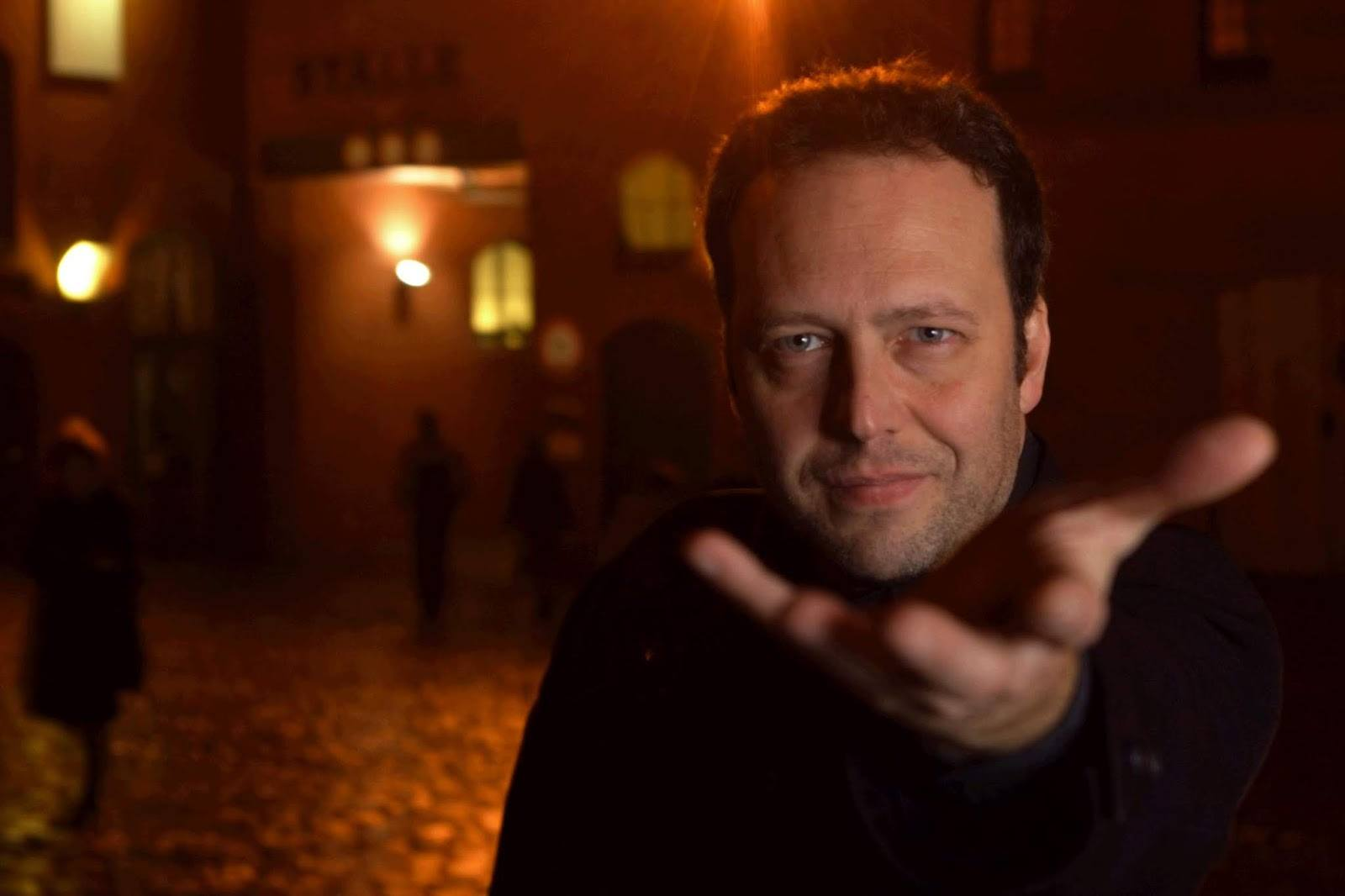 Claudio Pozzani